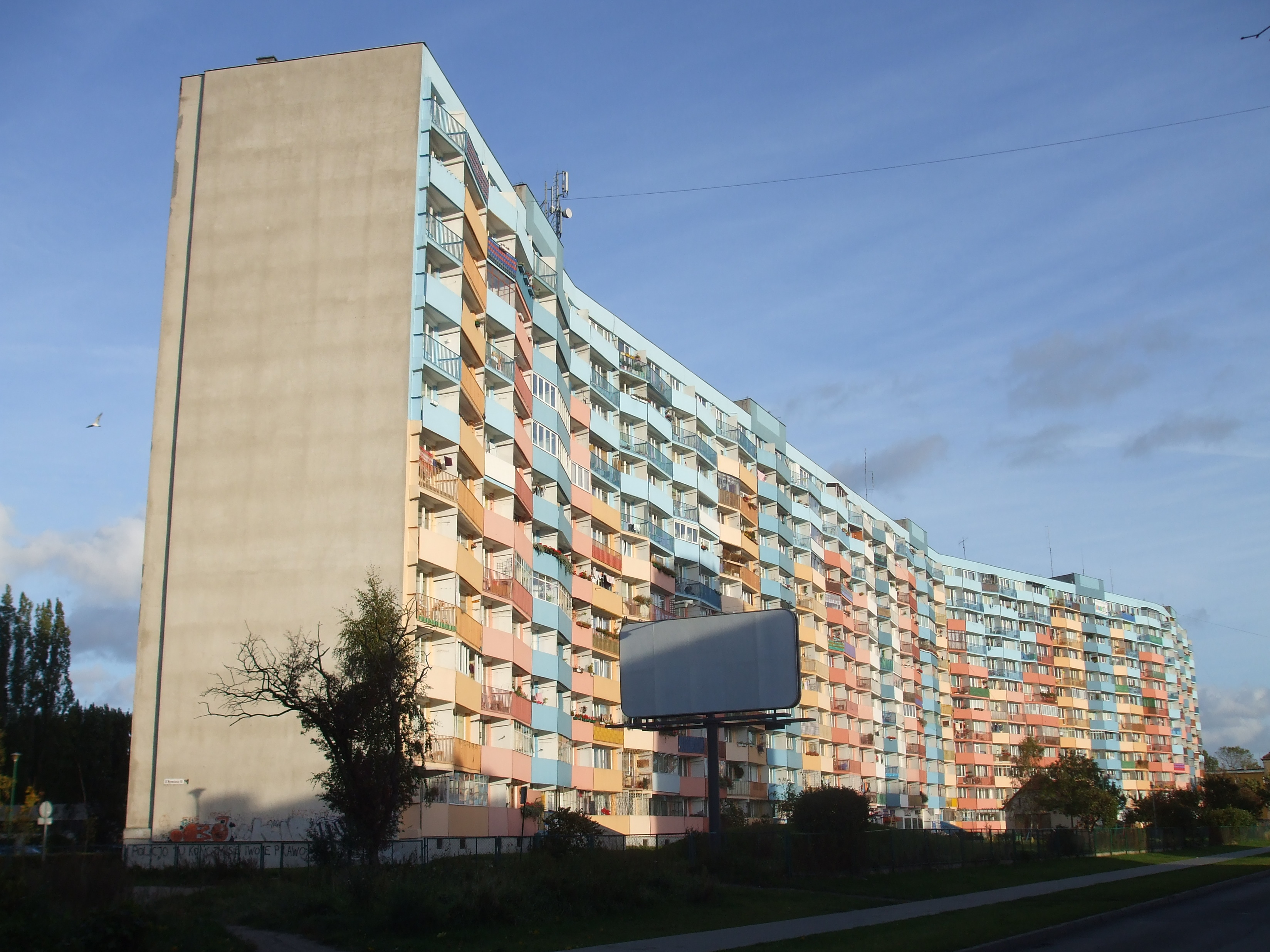 Tył "falowca" (balkony) w gdańskim Nowym Porcie, ul. Wyzwolenia 51.